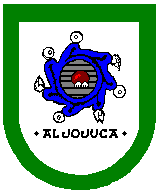 Escudo de Aljojuca, Puebla